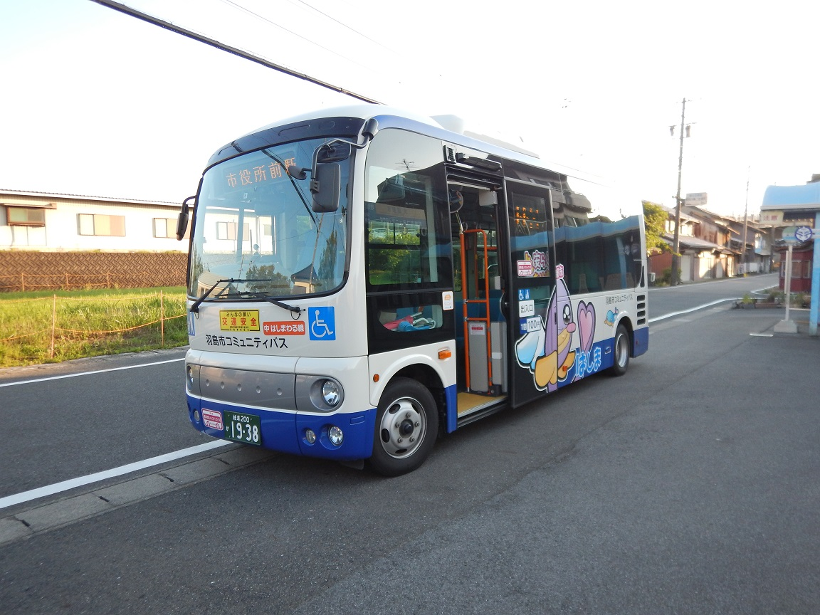 名鉄 大須駅跡地で客扱いをする代替バス